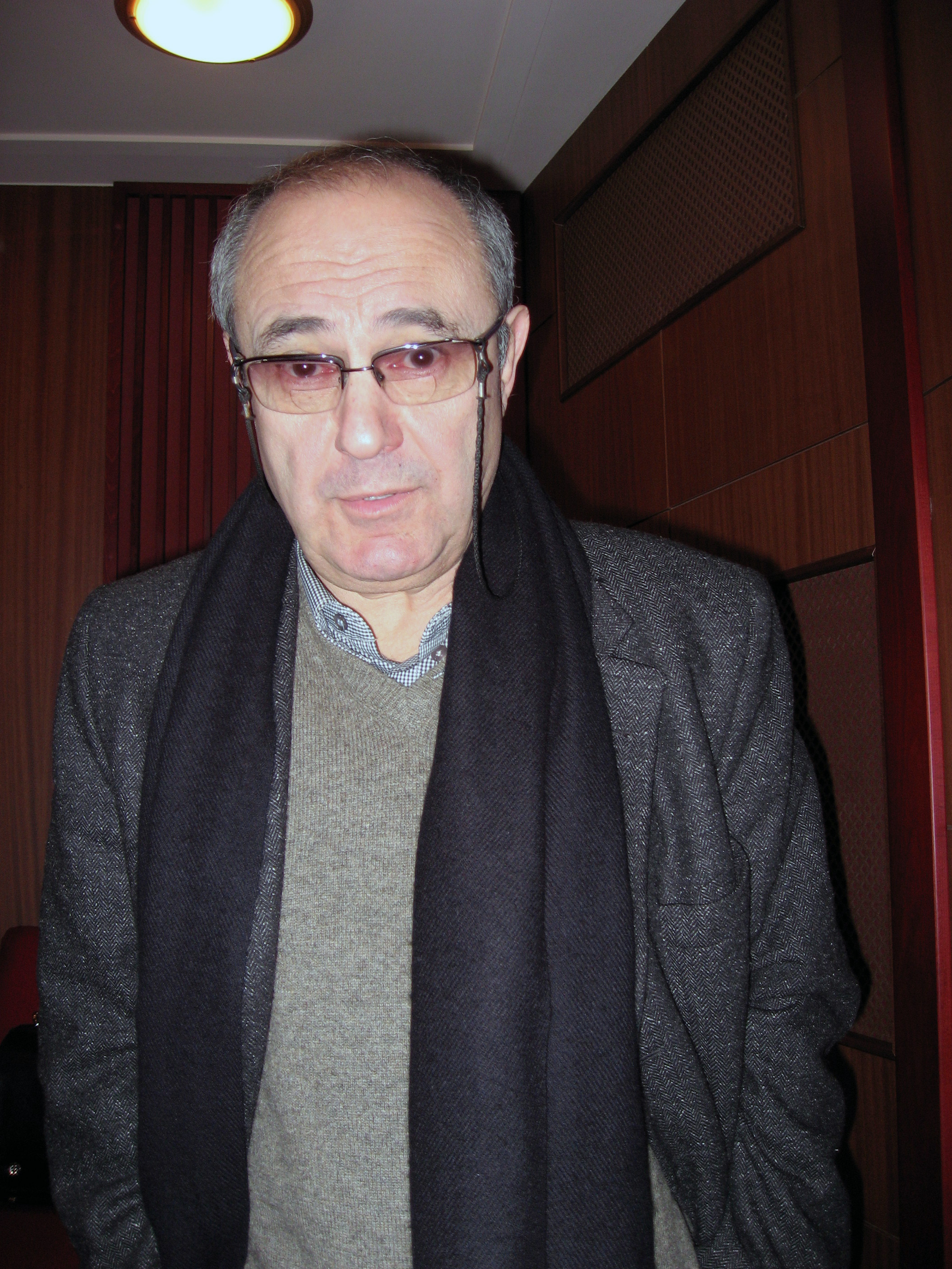 композитор Фарадж Караев